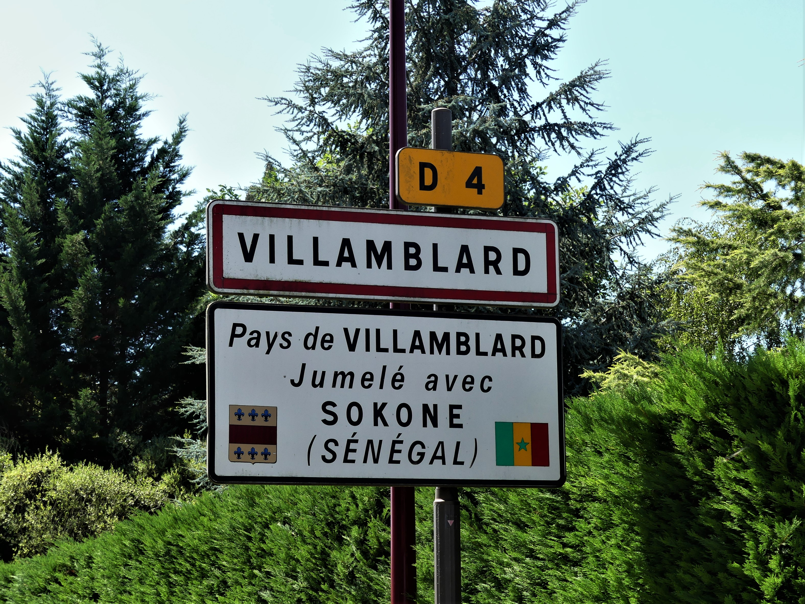 Panneau de jumelage du pays de Villamblard, Dordogne, France.